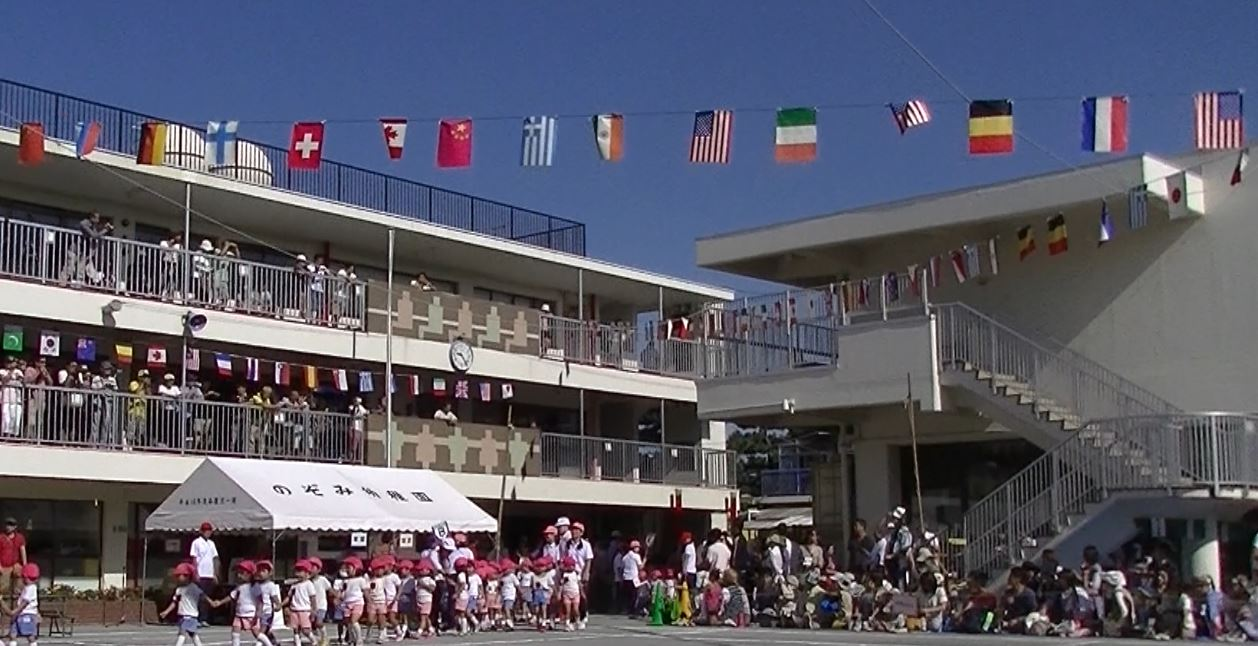 のぞみ幼稚園（藤沢市辻堂）